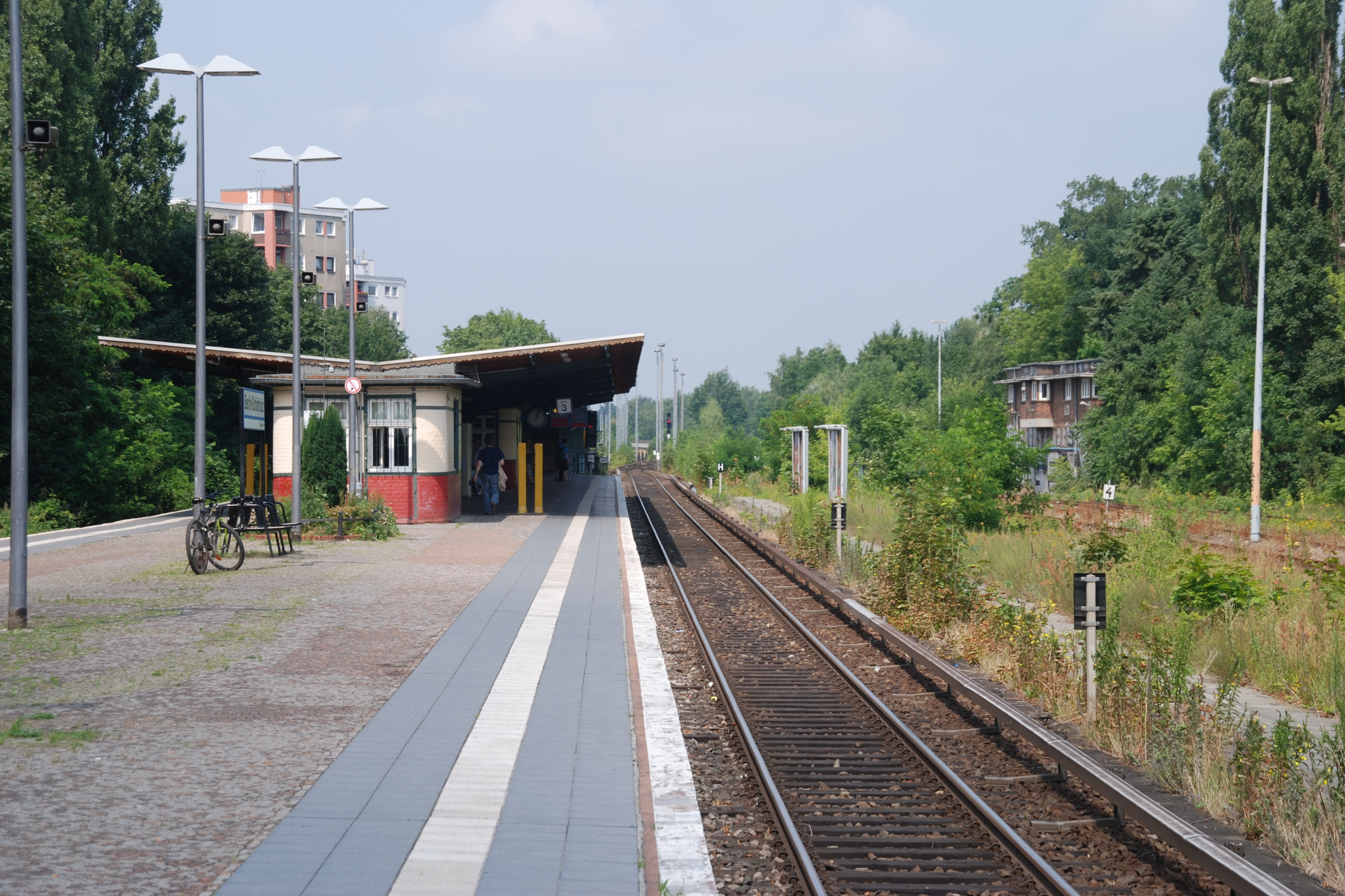 S-Bahnhof Berlin-Schönholz